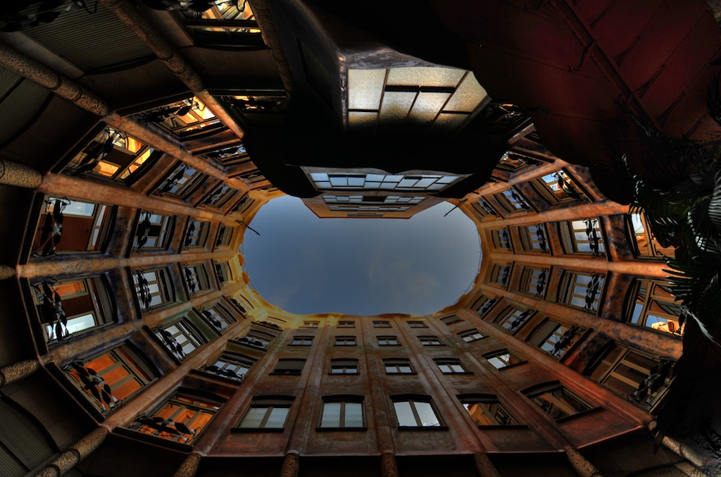 Vista del interior de La Pedrera.